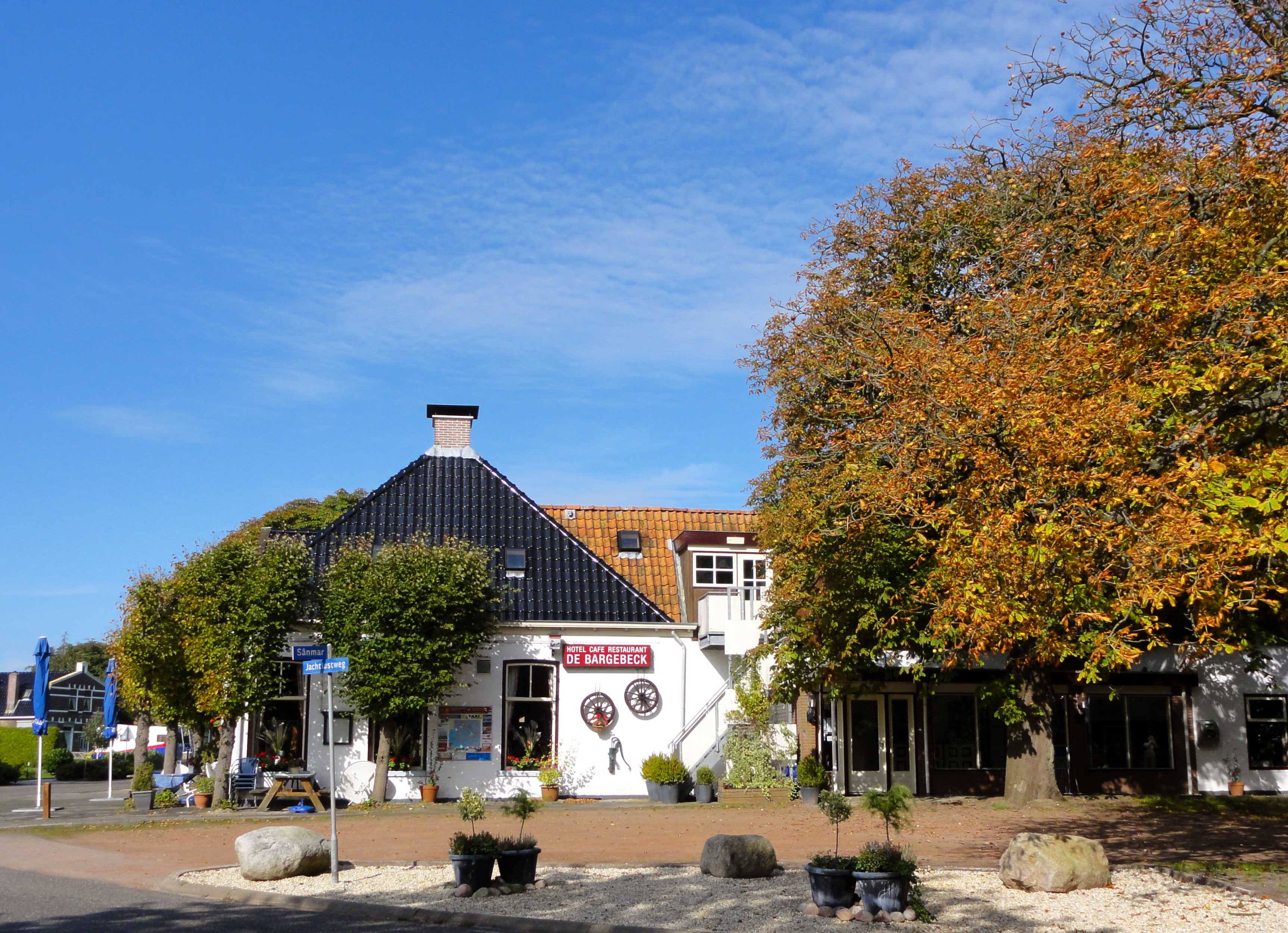 Bargebek, een buurtschap in Gaasterlân-Sleat